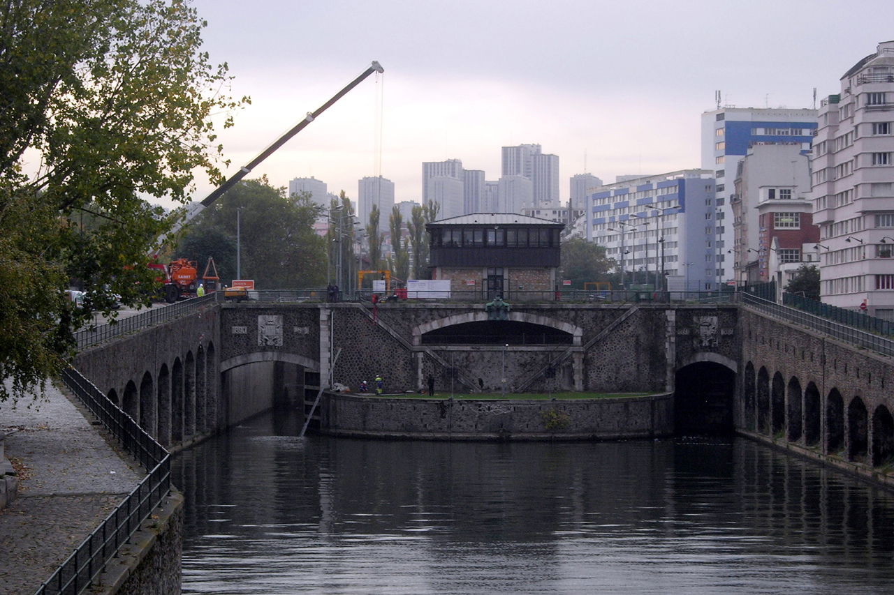 Ecluse du pont de Flandre sur le canal de Saint-Denis à Paris durant le chomage en 2008